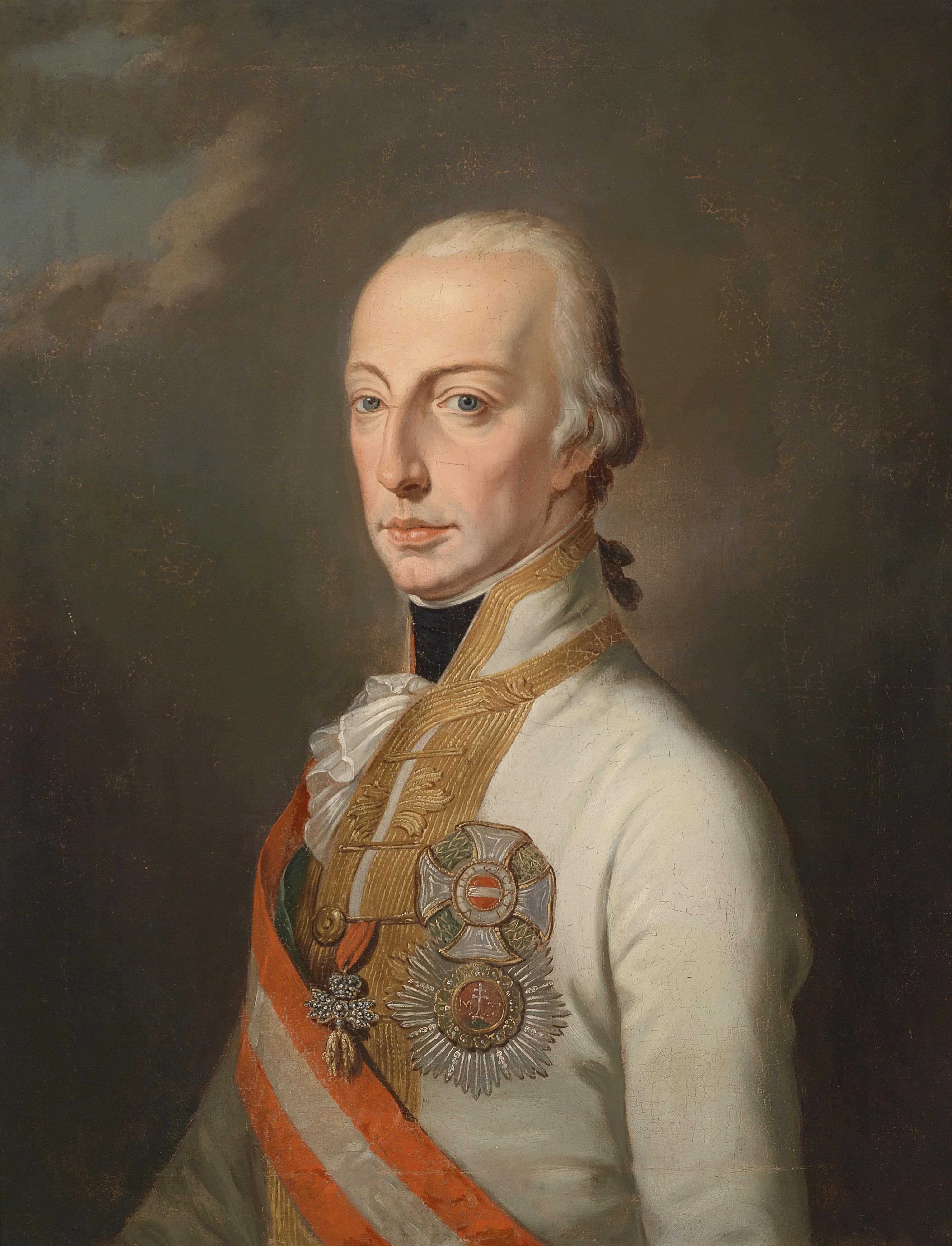 Kaiser Franz I. von Österreich in Feldmarschallsuniform, dekoriert mit den österreichischen Hausorden